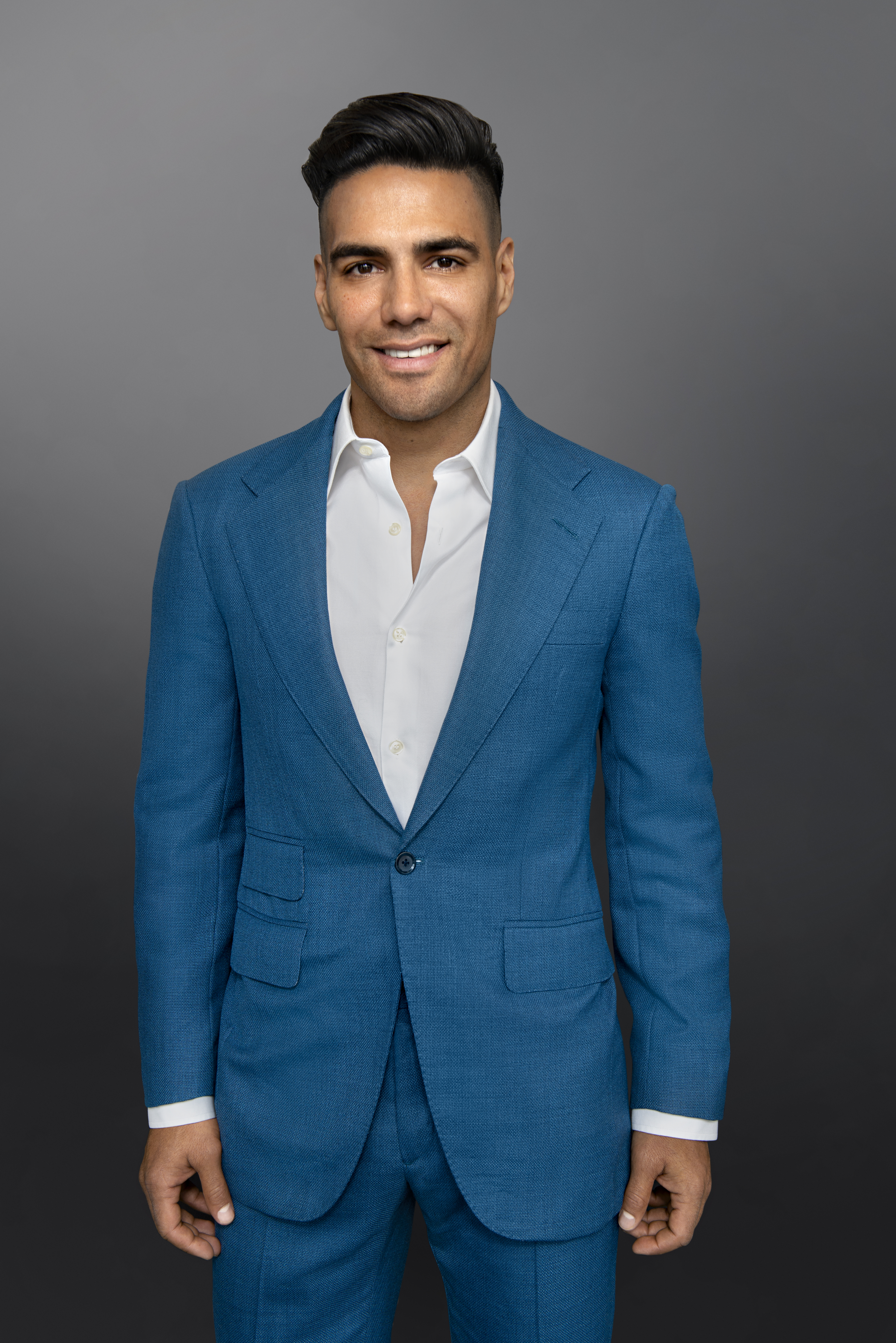 Radamel Falcao García à Cannes pose pour Gil Zetbase